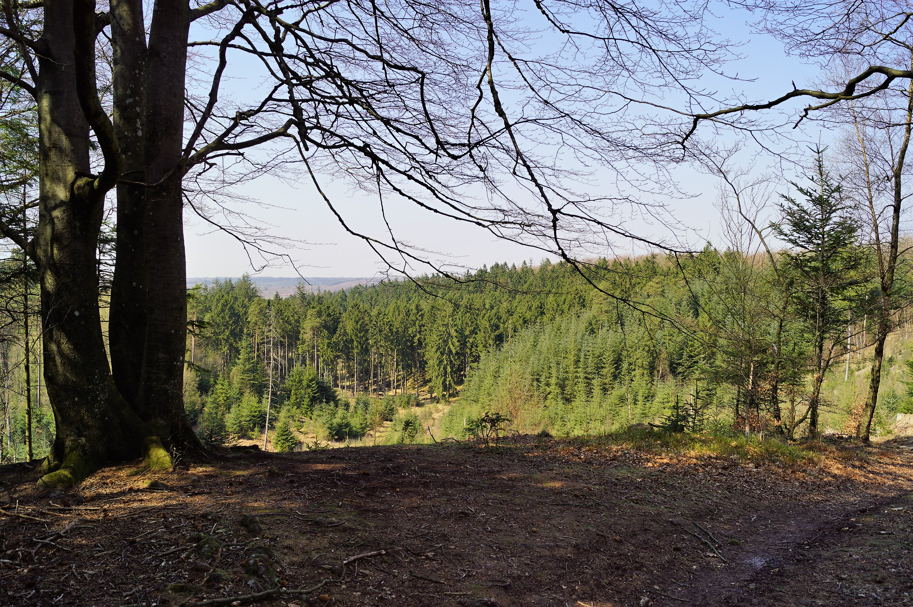 Silkeborg Vesterskov, udsigt mod nordvest fra "Flagstangen"